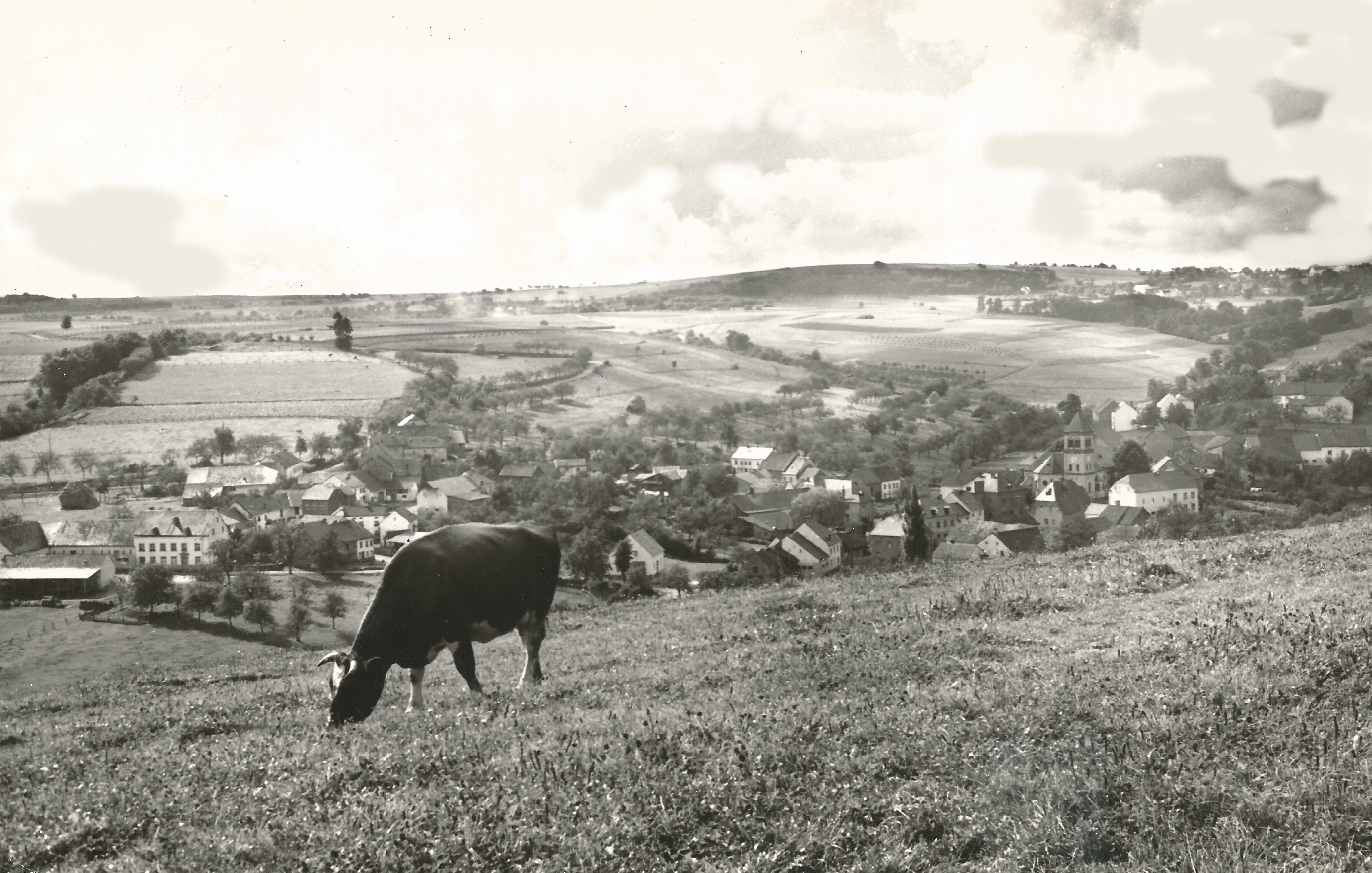 Baustert um 1960. Ansicht aus Nord-Osten.